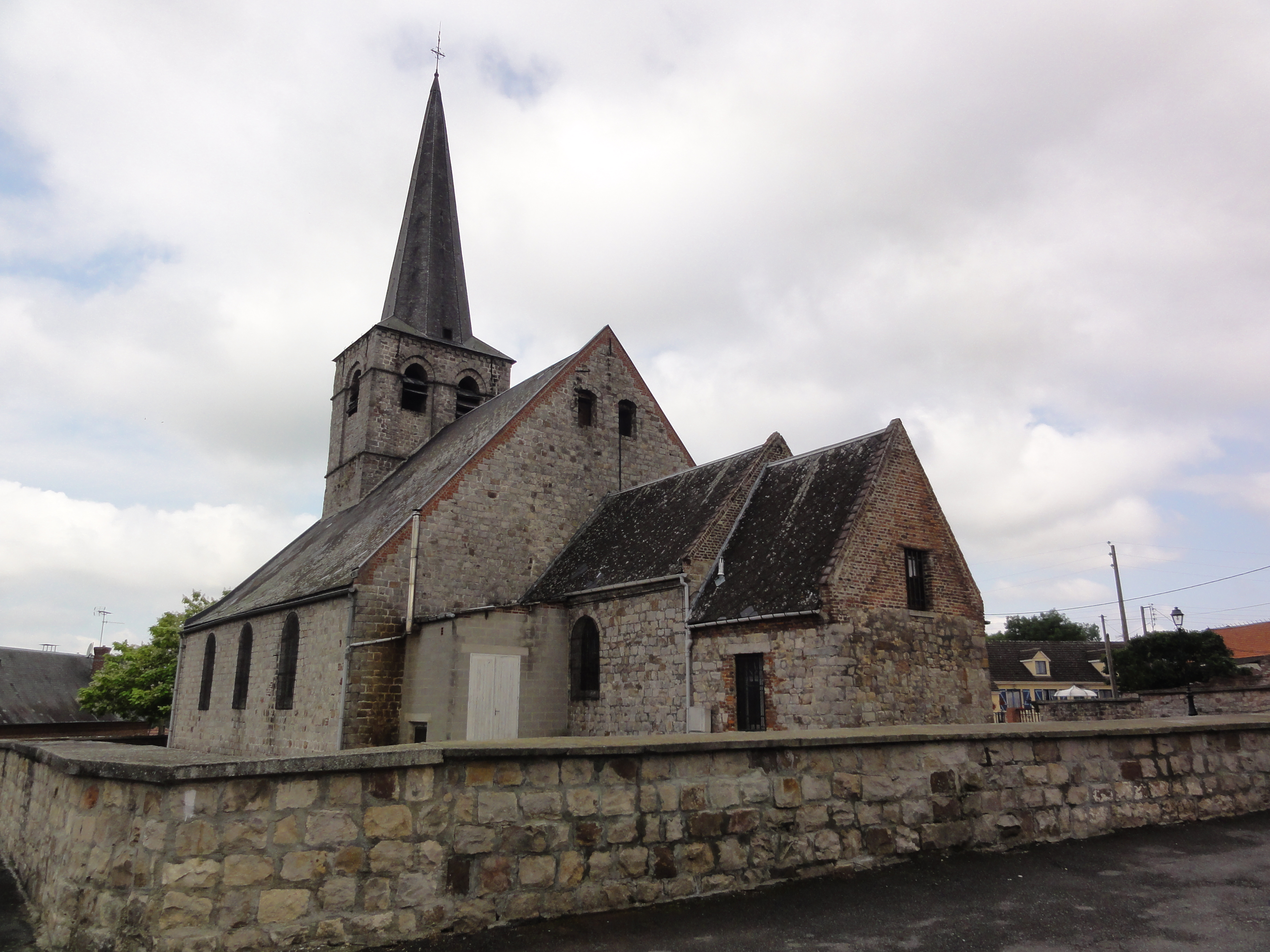 Bermerain (Nord, Fr) église, coté chevet